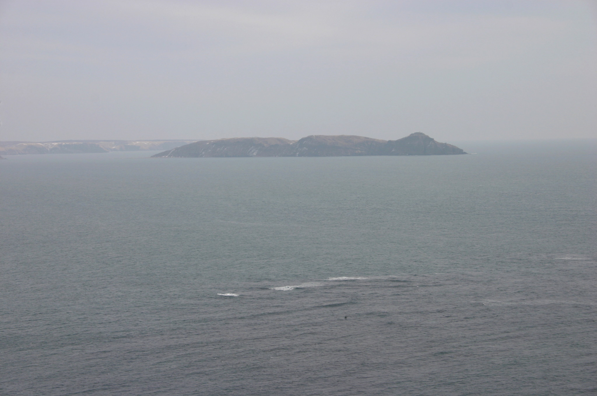 大黒島（厚岸町） 尻羽岬より